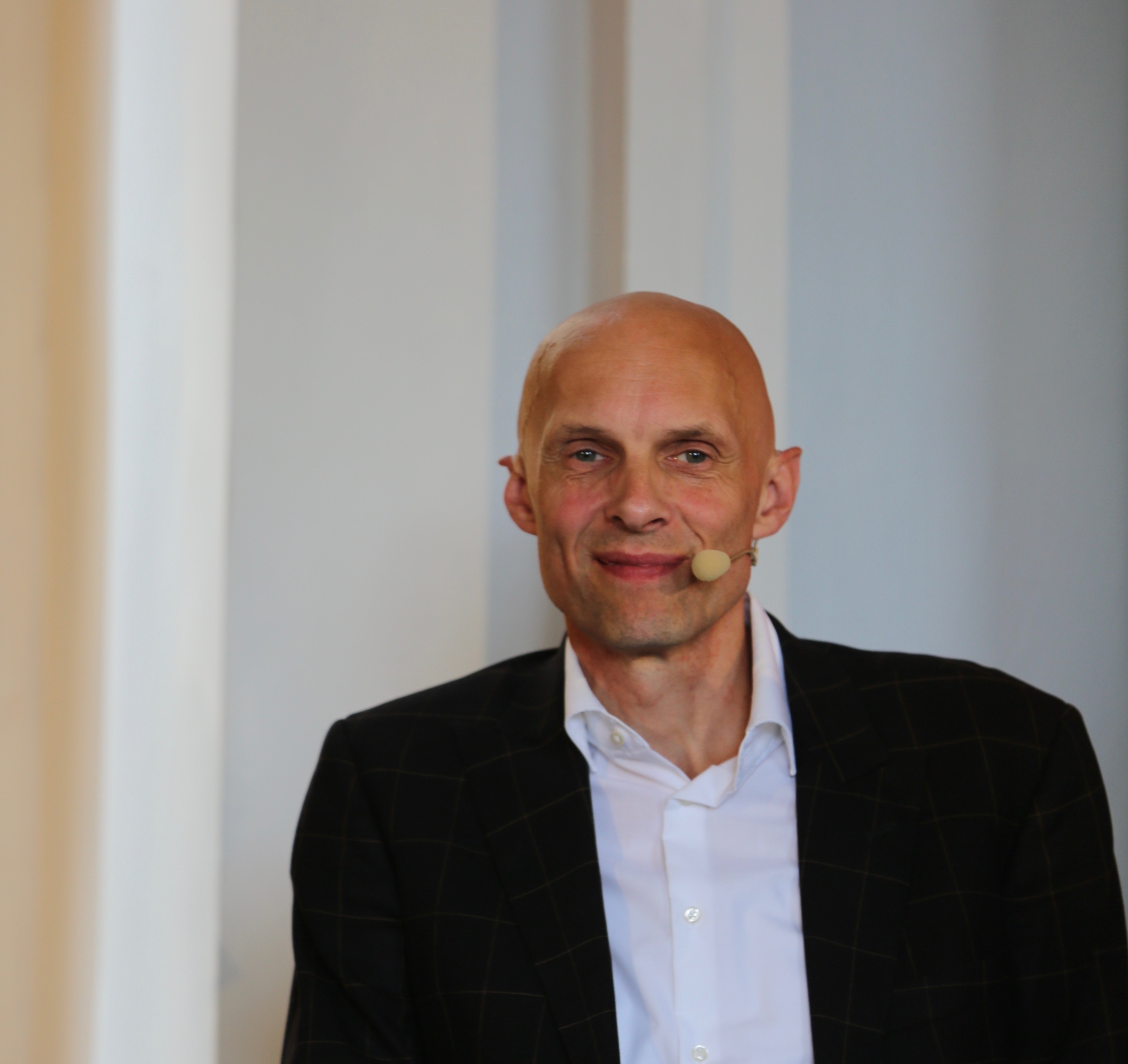 Michael Lentz beim Erlanger Poetenfest 2018